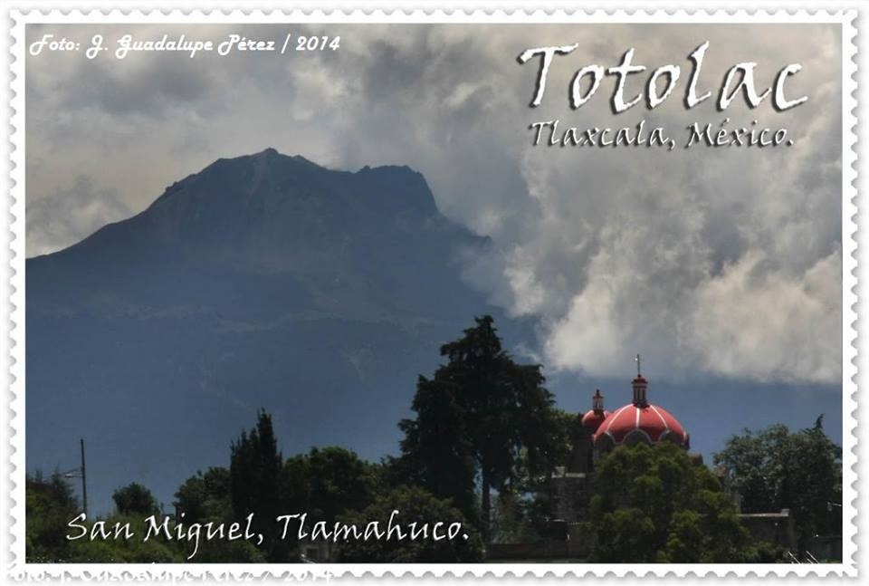 San Miguel Tlamahuco This image contains digital watermarking or credits in the image itself. The usage of visible watermarks is discouraged. If a non-watermarked version of the image is available, please upload it under the same file name and then remove this template. Ensure that removed information is present in the image description page and replace this template with Metadata from image or Attribution metadata from licensed image . Caution: Before removing a watermark from a copyrighted image, please read the WMF's analysis of the legal ramifications of doing so, as well as Commons' proposed policy regarding watermarks. If the old version is still useful, for example if removing the watermark damages the image significantly, upload the new version under a different title so that both can be used. After uploading the non-watermarked version, replace this template with Superseded | new filename | version without watermarks .